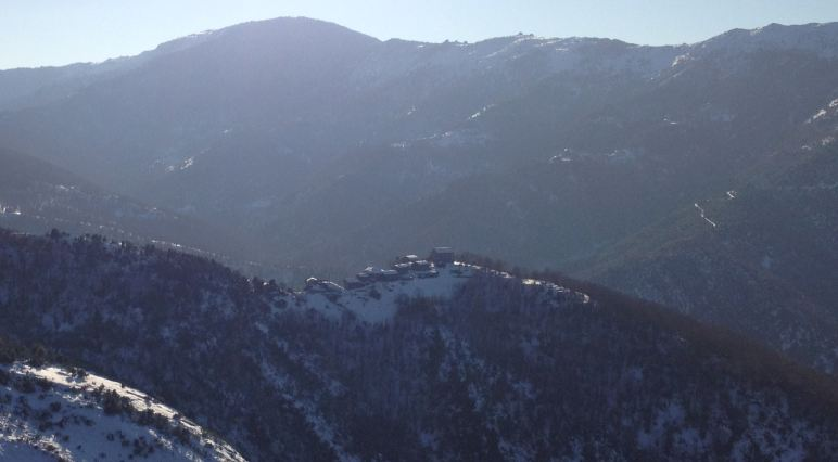 Vue générale en hiver